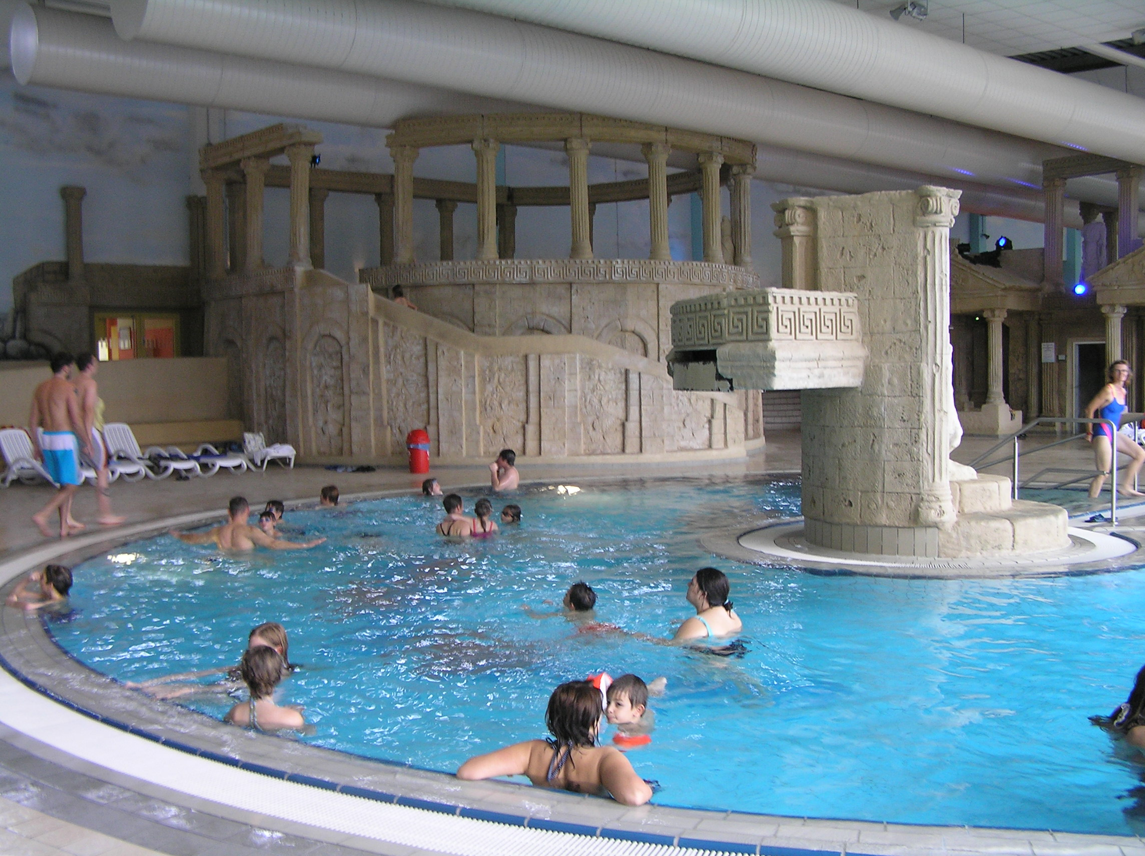 Erlebnisbad Obertshausen (früher Atlantis, heute monte mare)